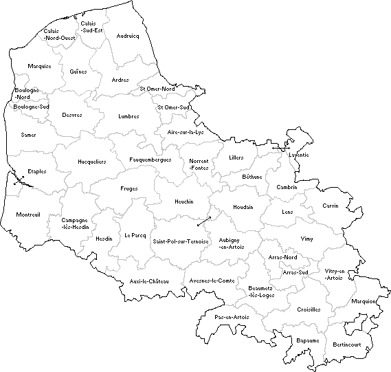 Cantons du Pas-de-Calais en 1887